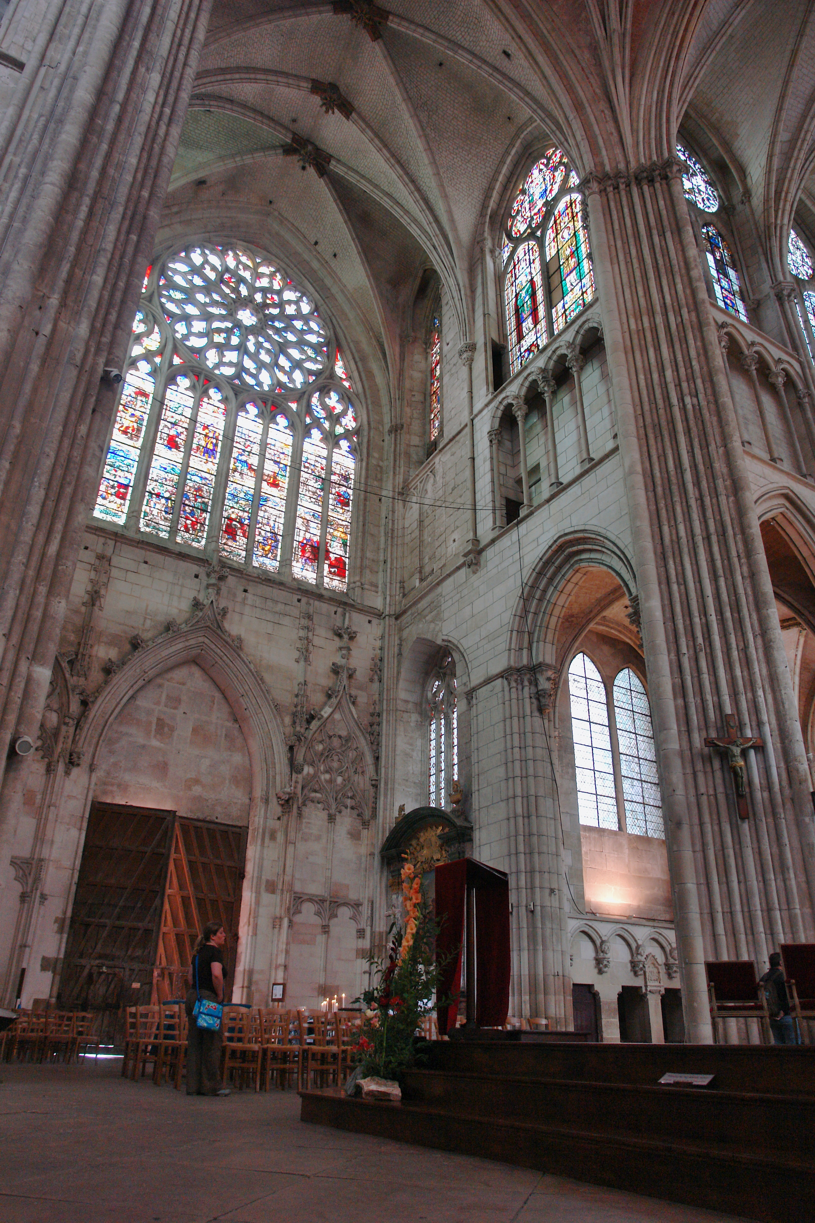 Querschiff der Kathedrale Saint-Etienne, Auxerre, Frankreich